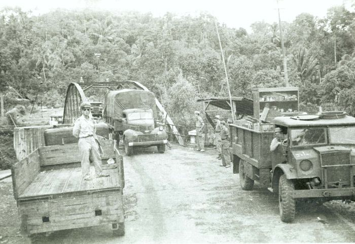 negatief. Militaire kolonne passeert een brug in de omgeving van Tjipanas